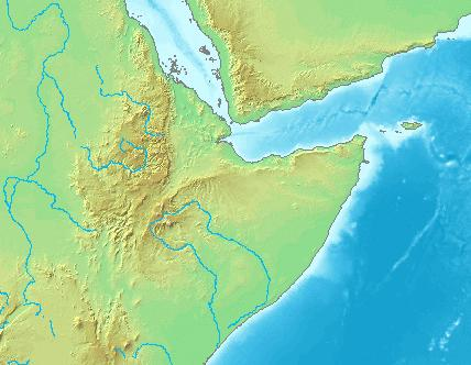 Etioopia mägismaa kaart